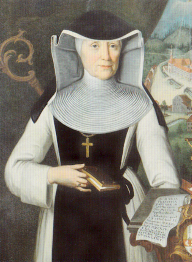 Maria Franziska Cajetana von Zurthannen, Äbtissin des Zisterzienserinnenklosters Günterstal